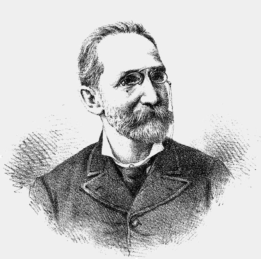 Dr. Aristides da Silveira Lobo. Senador pela Capital Federal - membro do Governo Provisório, e um dos fundadores da República Brasileira.